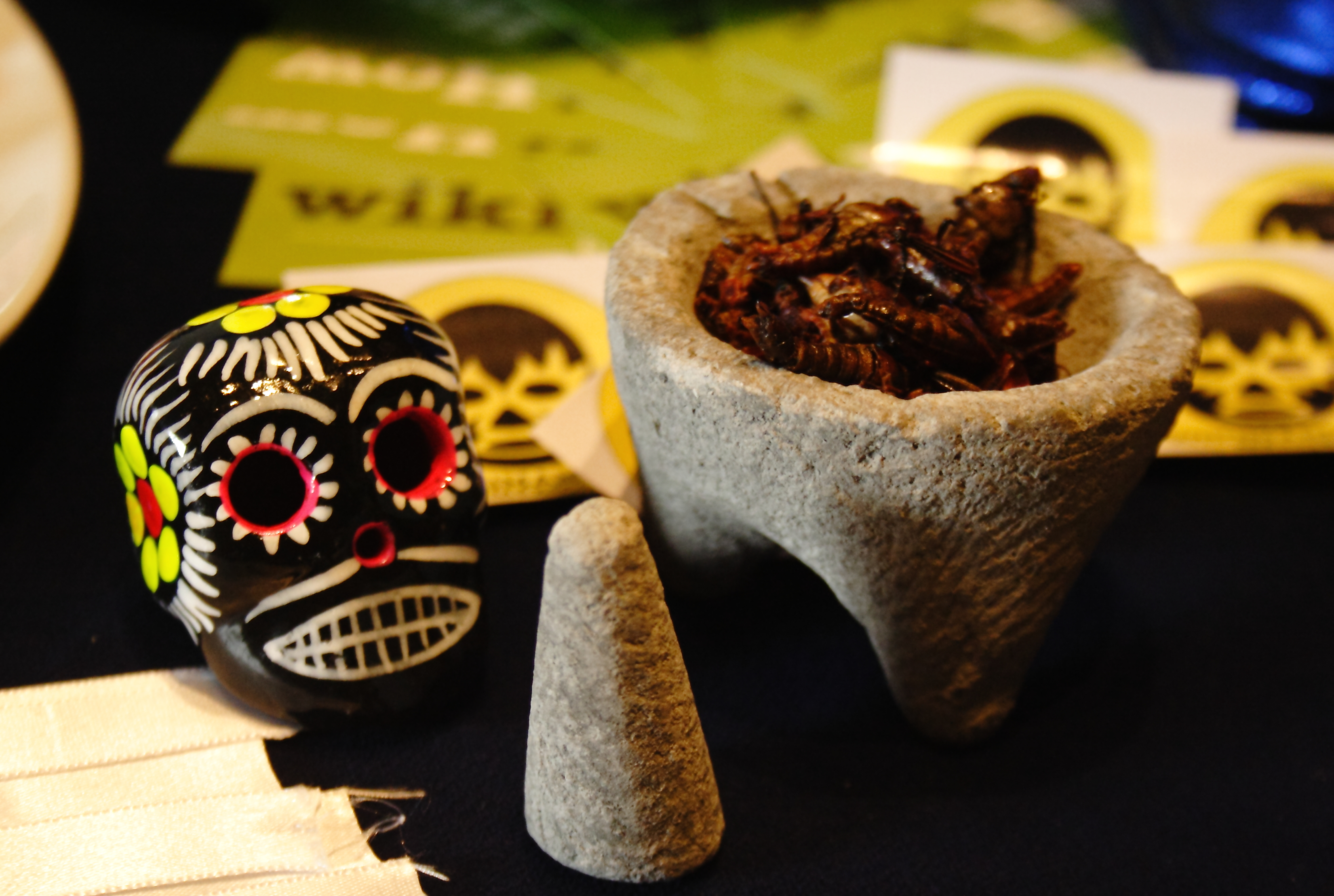 Mini molcajete y cráneo decorado.